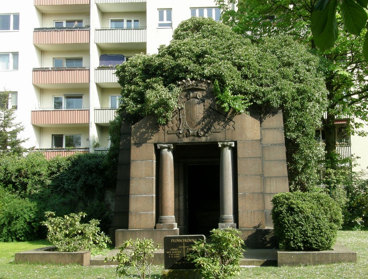 Luisenfriedhof I in Berlin - Mausoleum für Ida von Blücher. Entwurf von Paul Wittig.